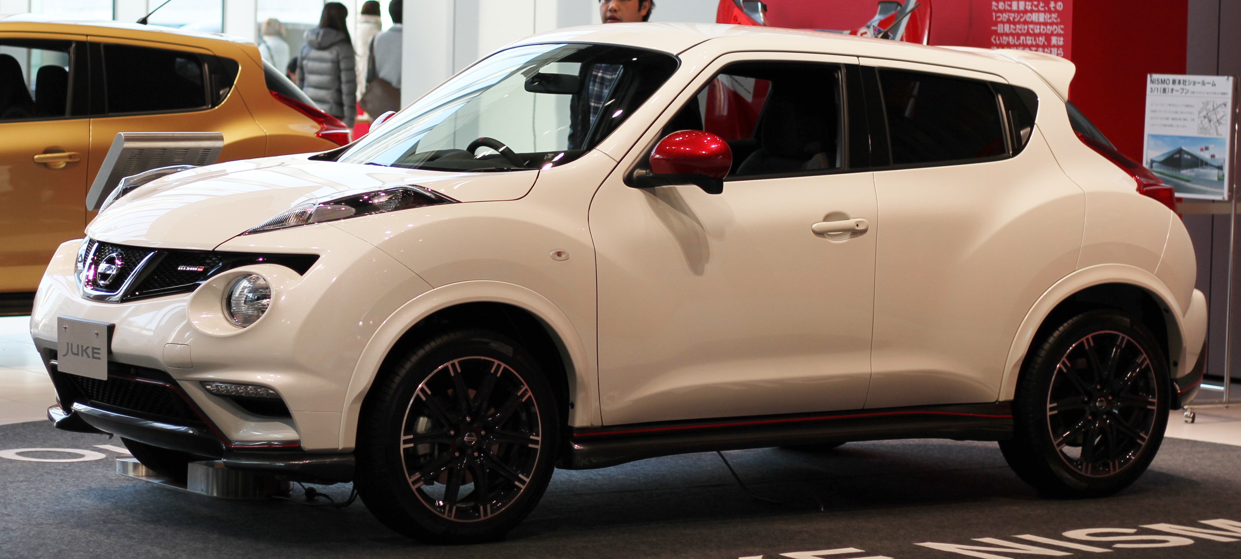 Nissan Juke